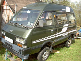 Subaru E-10 Columbus